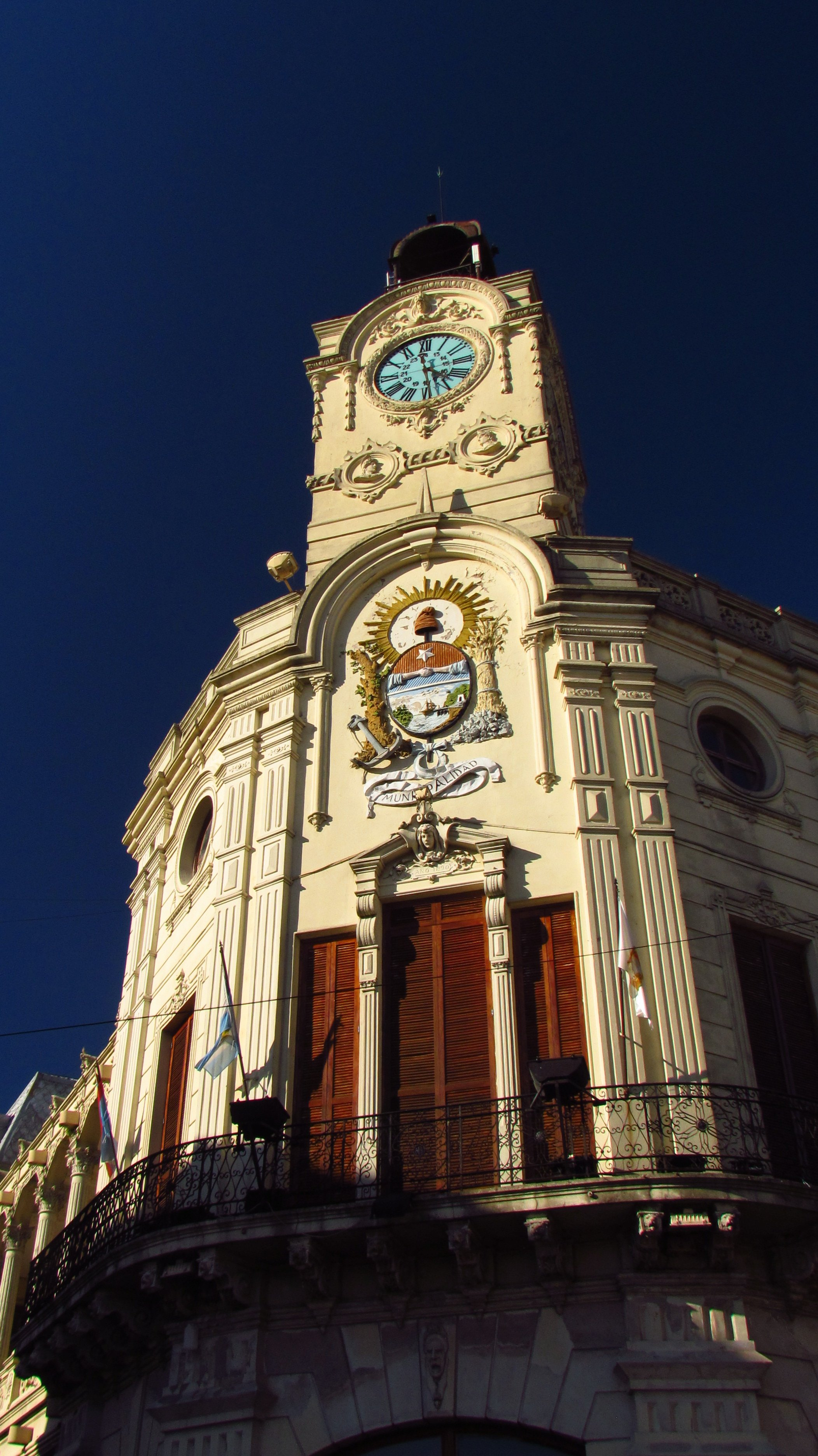 Parana, Entre Rios, Argentina